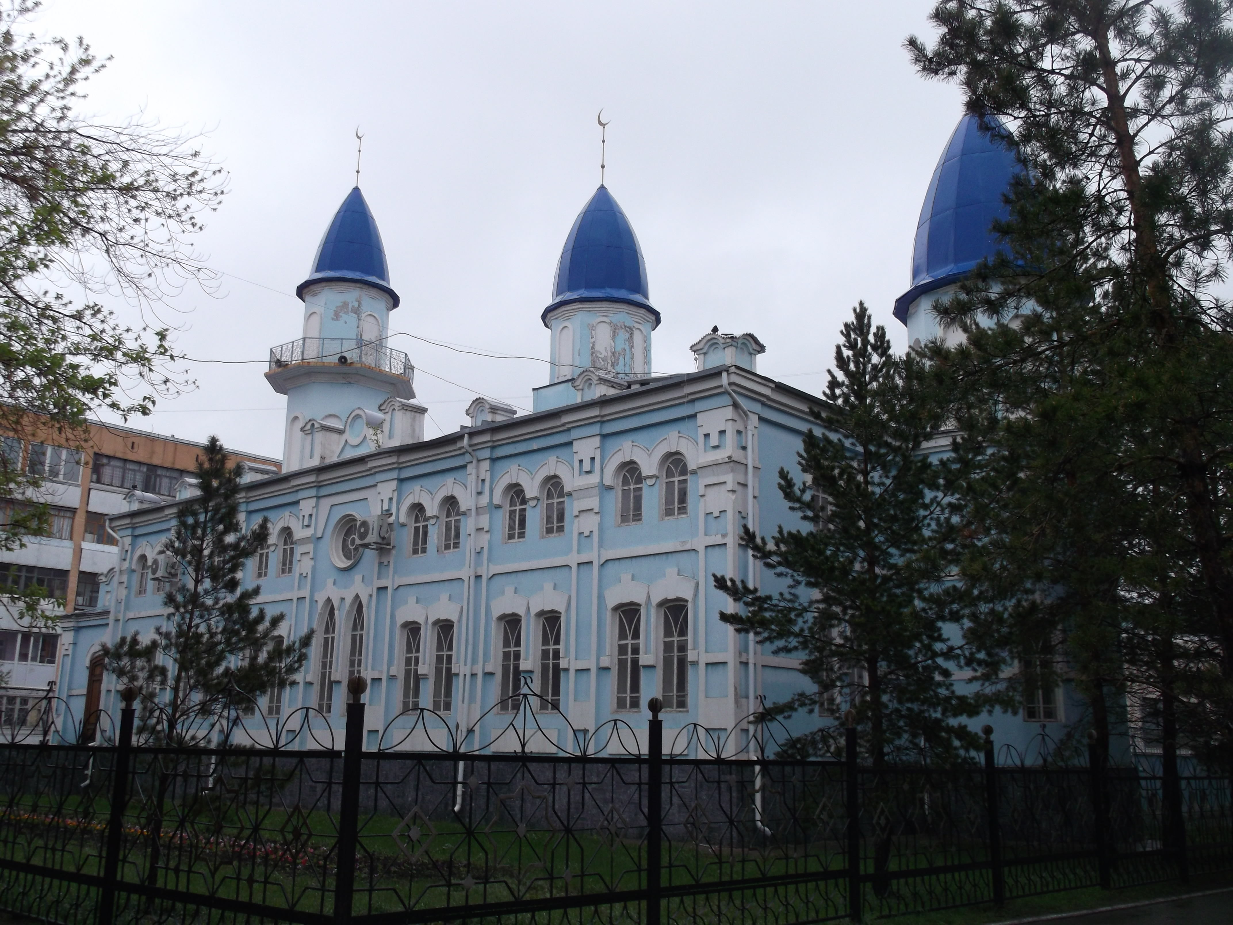 Kostanay 110000, Kazakhstan